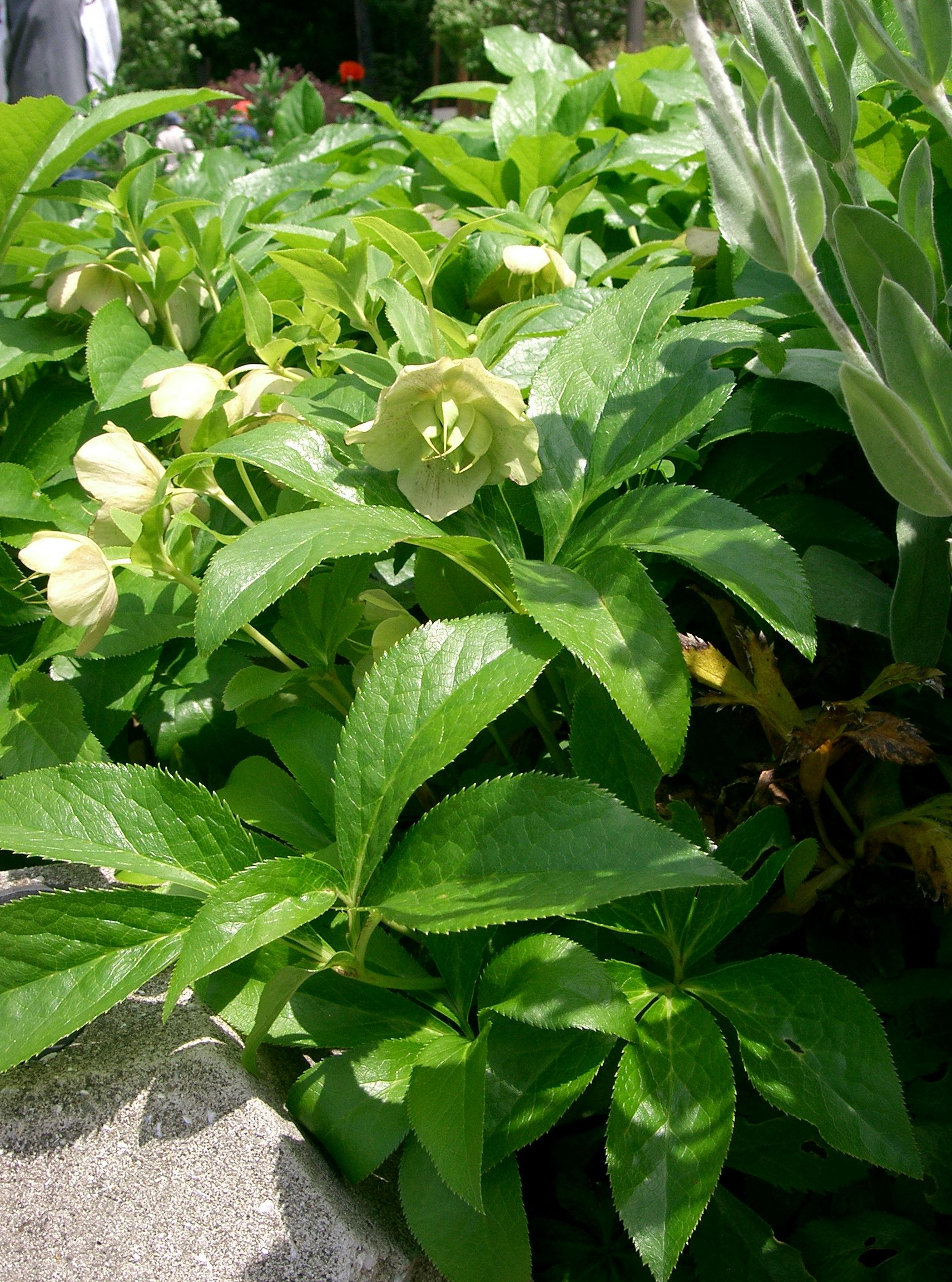 Helleborus orientalis